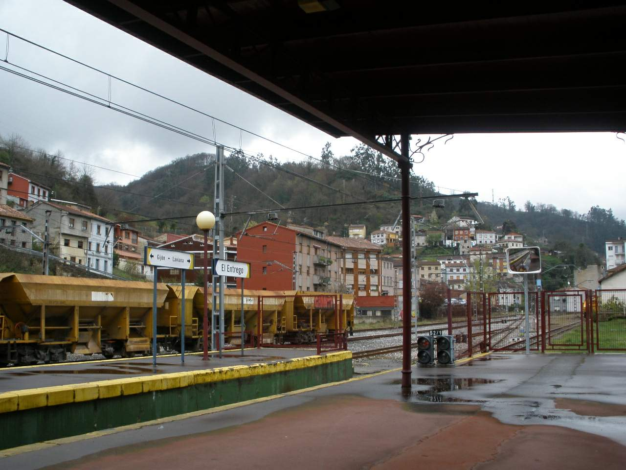 El Entrego (San Martín del Rey Aurelio) - Estación de FEVE